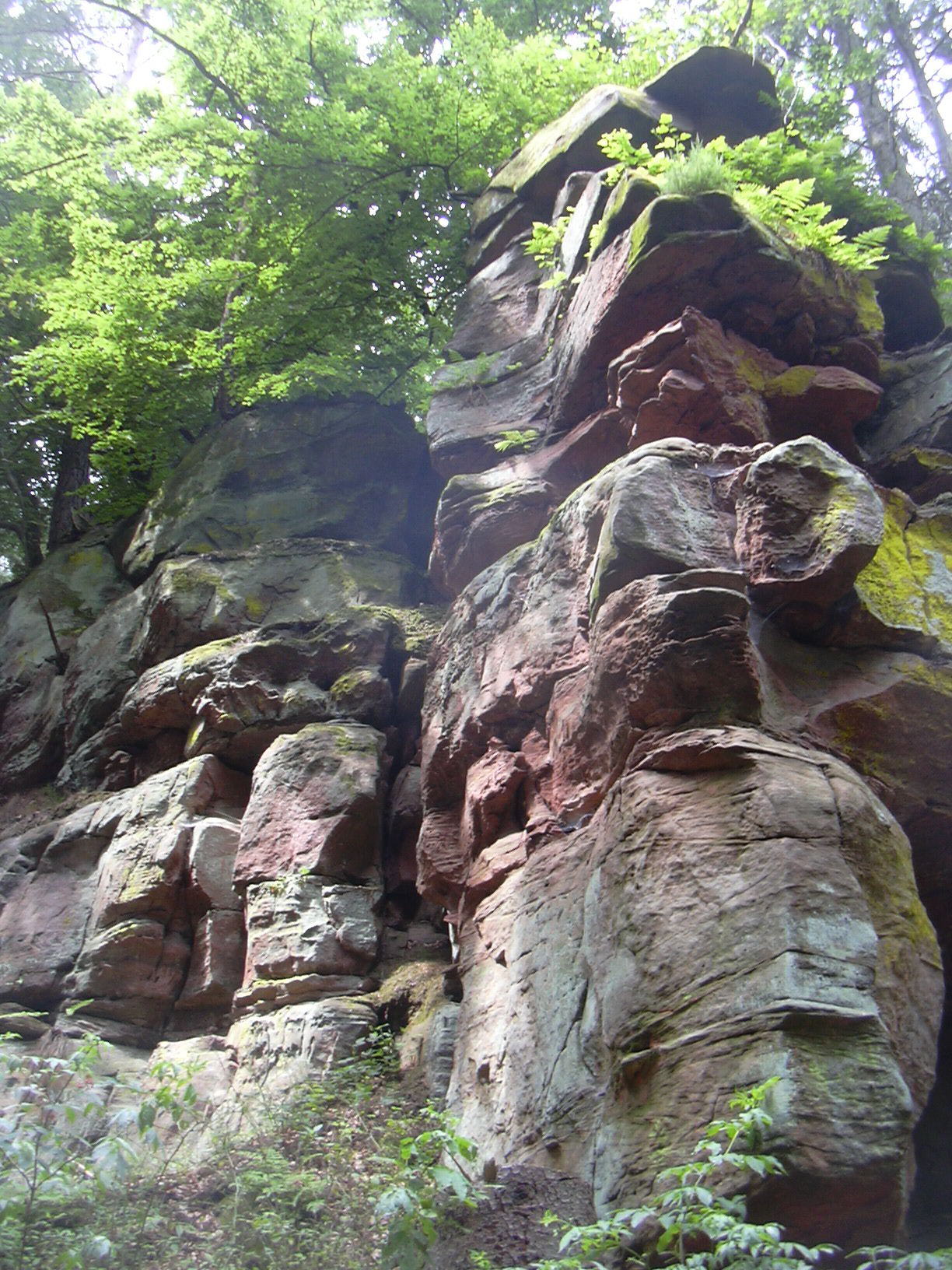 Sandstone Rocks near Heidelsburg (Roman castle), Pfälzerwald/Germany